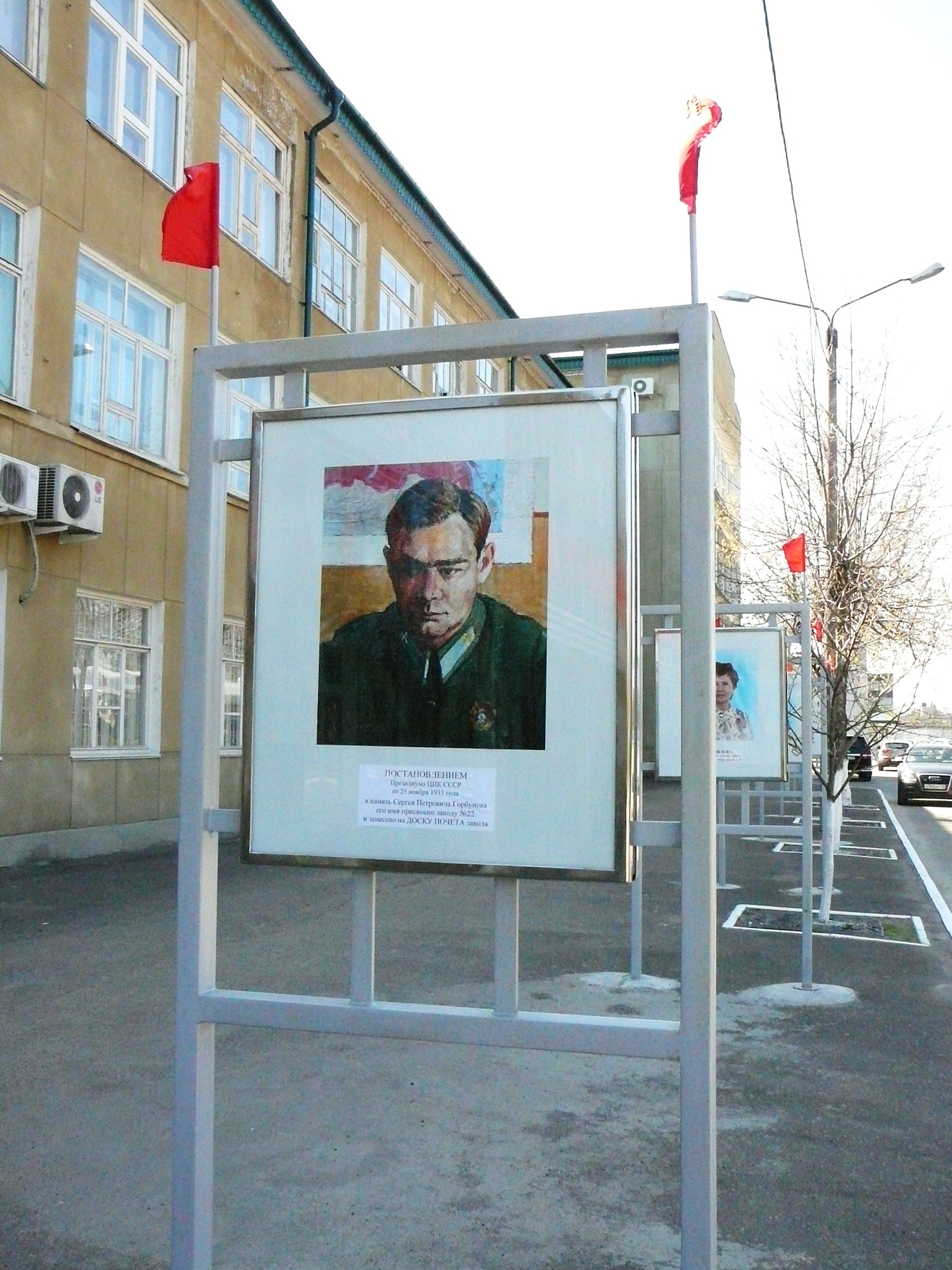 Портрет С. П. Горбунова на «Аллее славы» перед административным зданием КАПО им. С.П.Горбунова (г. Казань).